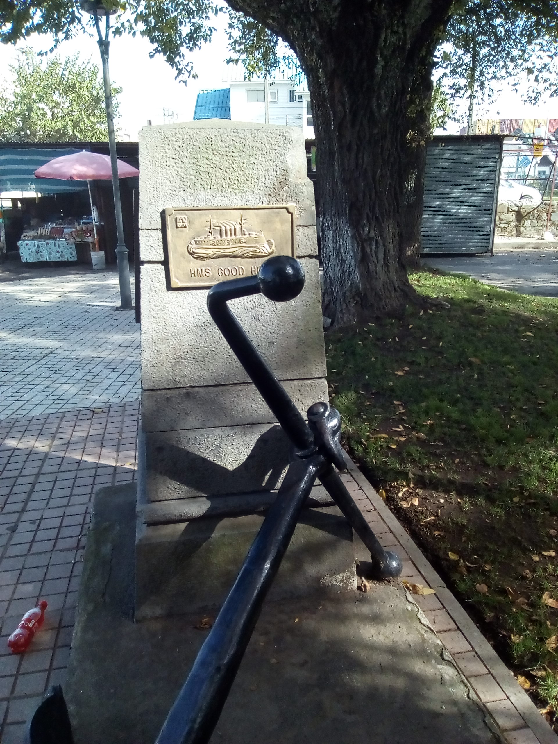 Placa recordatoria de la Batalla de Coronel en la localidad del mismo nombre, en Chile Continental.